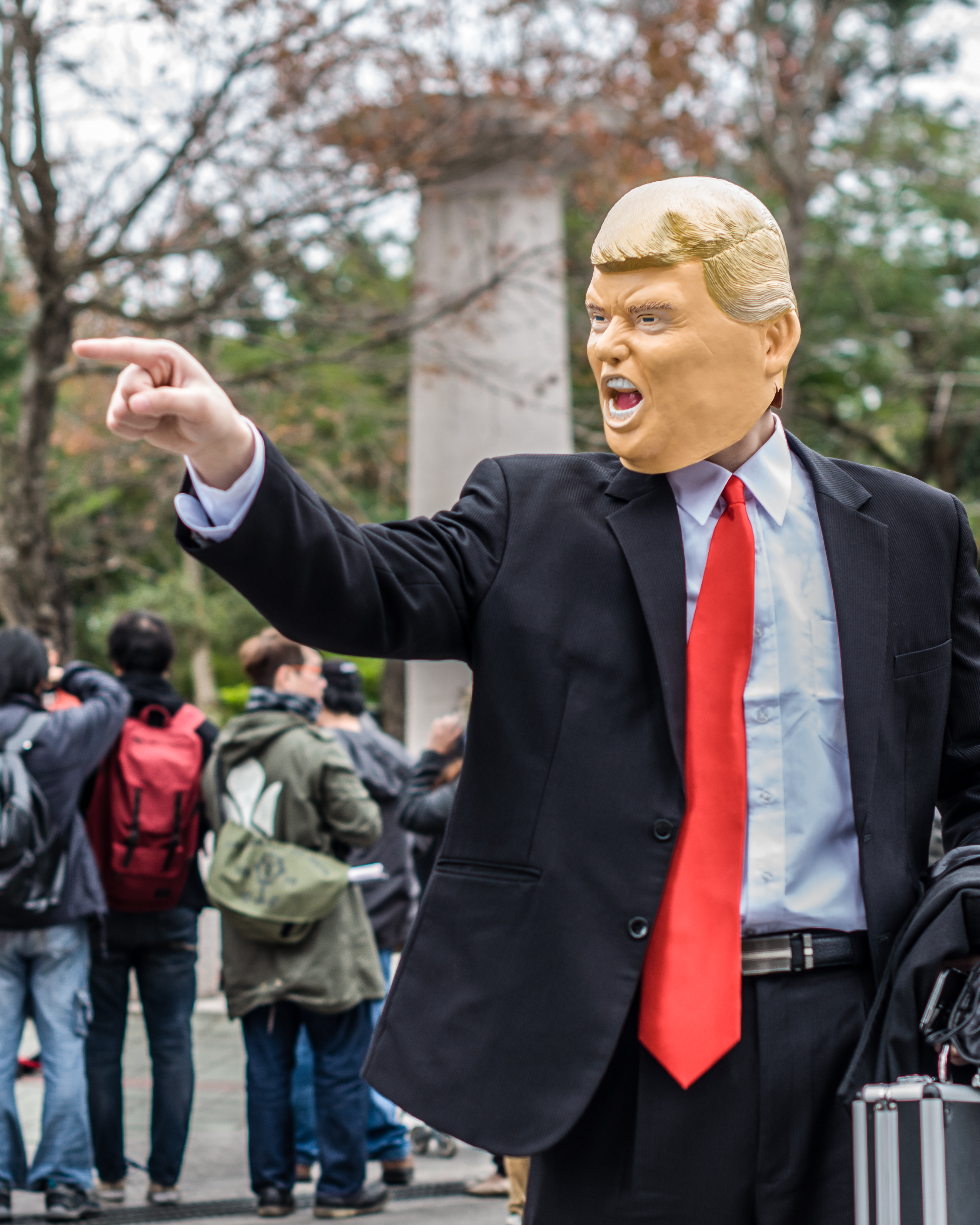 第29屆開拓動漫祭，唐納·川普cosplayer。